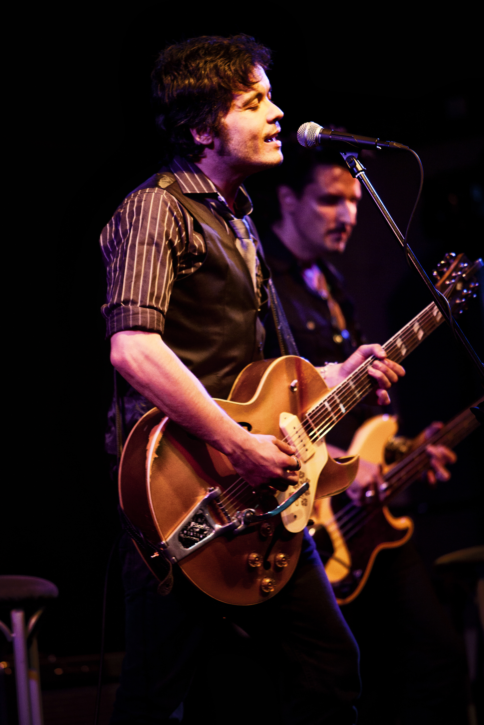 Diego Garcia en la sala Galileo (Madrid) en 2011